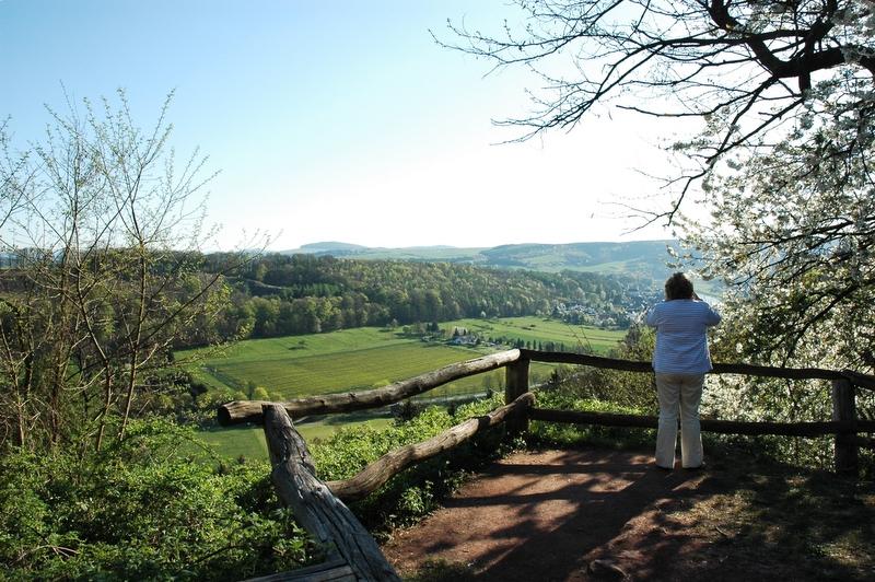 Aussichtspunkt Dreiländereck in das Wesertal hinter Bad Karlshafen, die Hannoverschen Klippen befinden sich weiter oberhalb